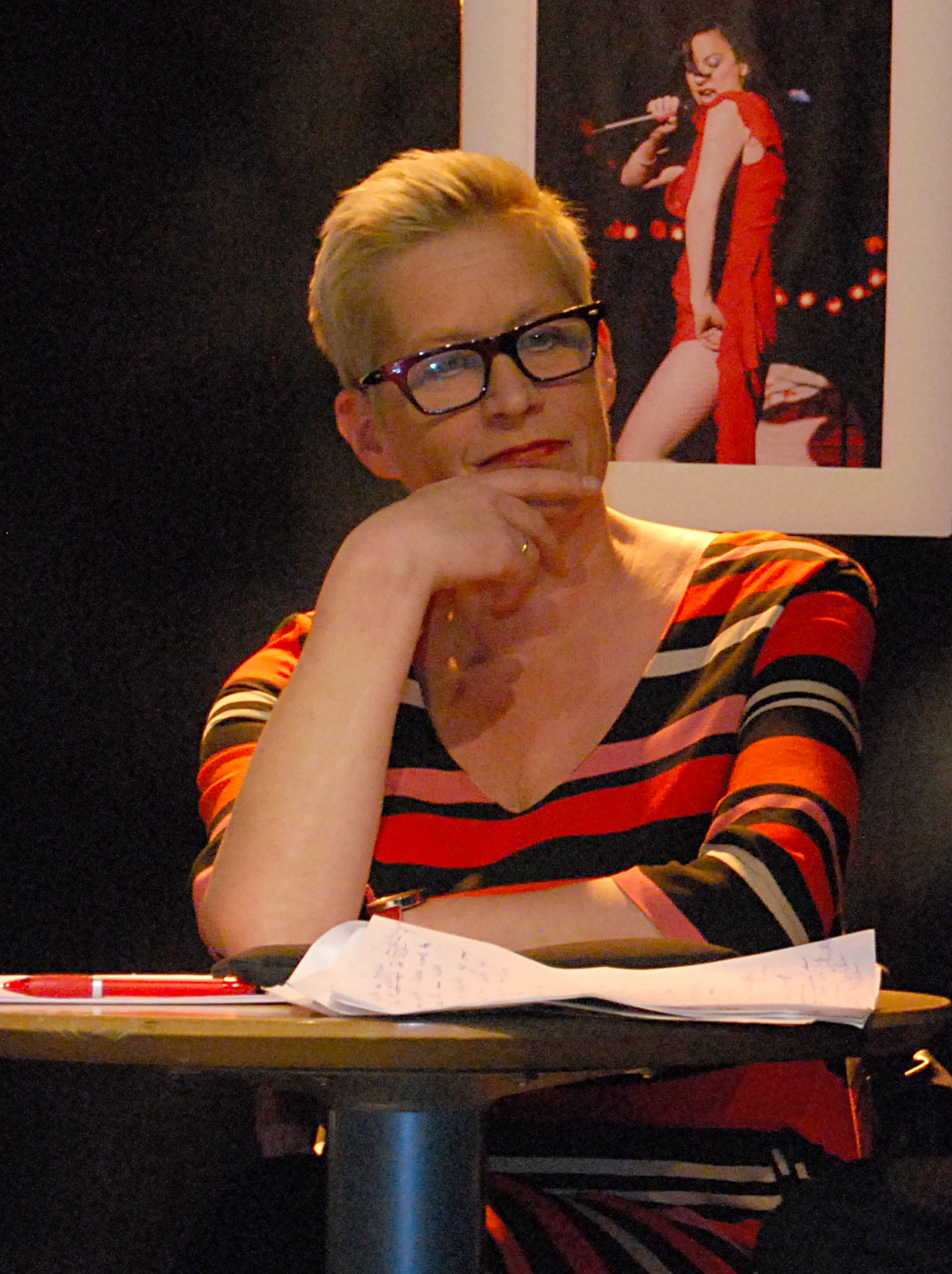 Anne Aasheim er fra 1. januar 2011 direktør i Norsk kulturråd. Hun er en norsk journalist med lang fartstid i NRK. Hun var i perioden 2006 – 2010 sjefredaktør i Dagbladet. Her fotografert under Aust-Agder fylkeskommunes kulturkonferanse i 2012.